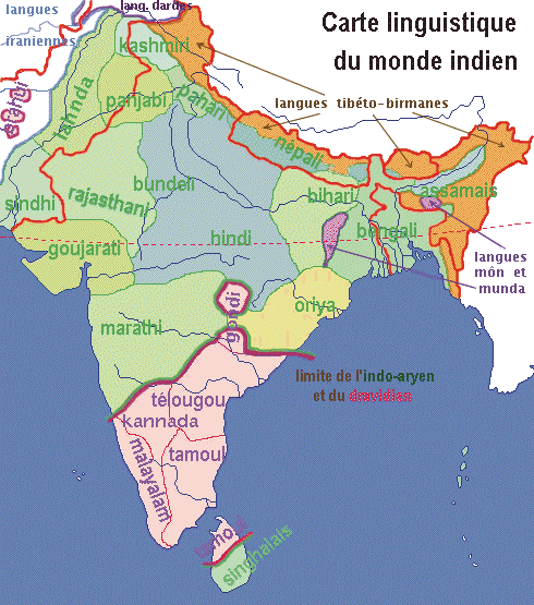 langues dans le monde indien